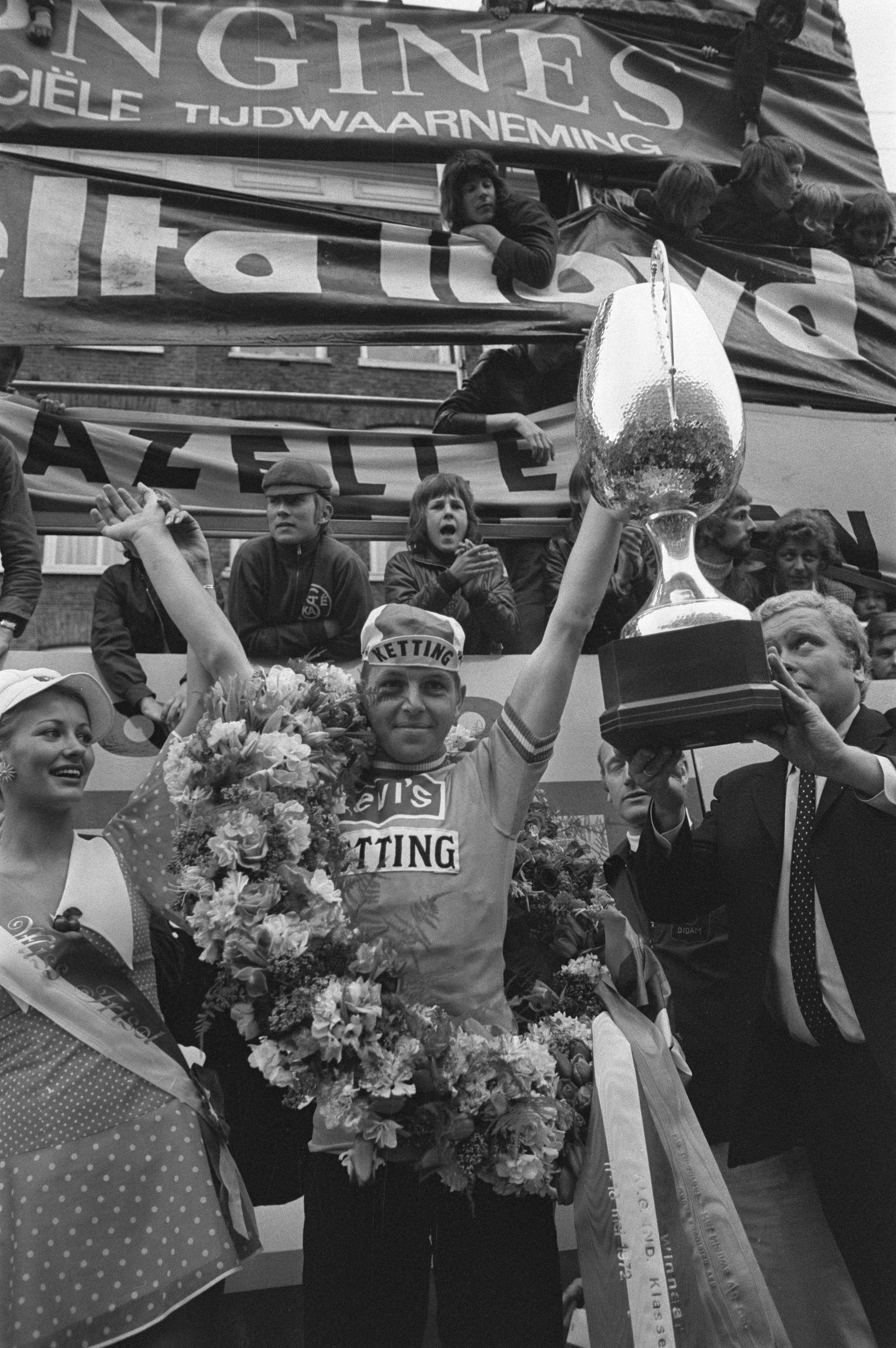 Collectie / Archief : Fotocollectie Anefo Reportage / Serie : Olympia's Tour 1972 Beschrijving : Huldiging van tourwinnaar Frits Schür Datum : 18 mei 1972 Locatie : Nederland Trefwoorden : huldigingen, sportprijzen, wielrennen Persoonsnaam : Schür, Frits Fotograaf : Rob Mieremet / Anefo Auteursrechthebbende : Nationaal Archief Materiaalsoort : Negatief (zwart/wit) Nummer archiefinventaris : bekijk toegang 2.24.01.05 Bestanddeelnummer : 925-6049